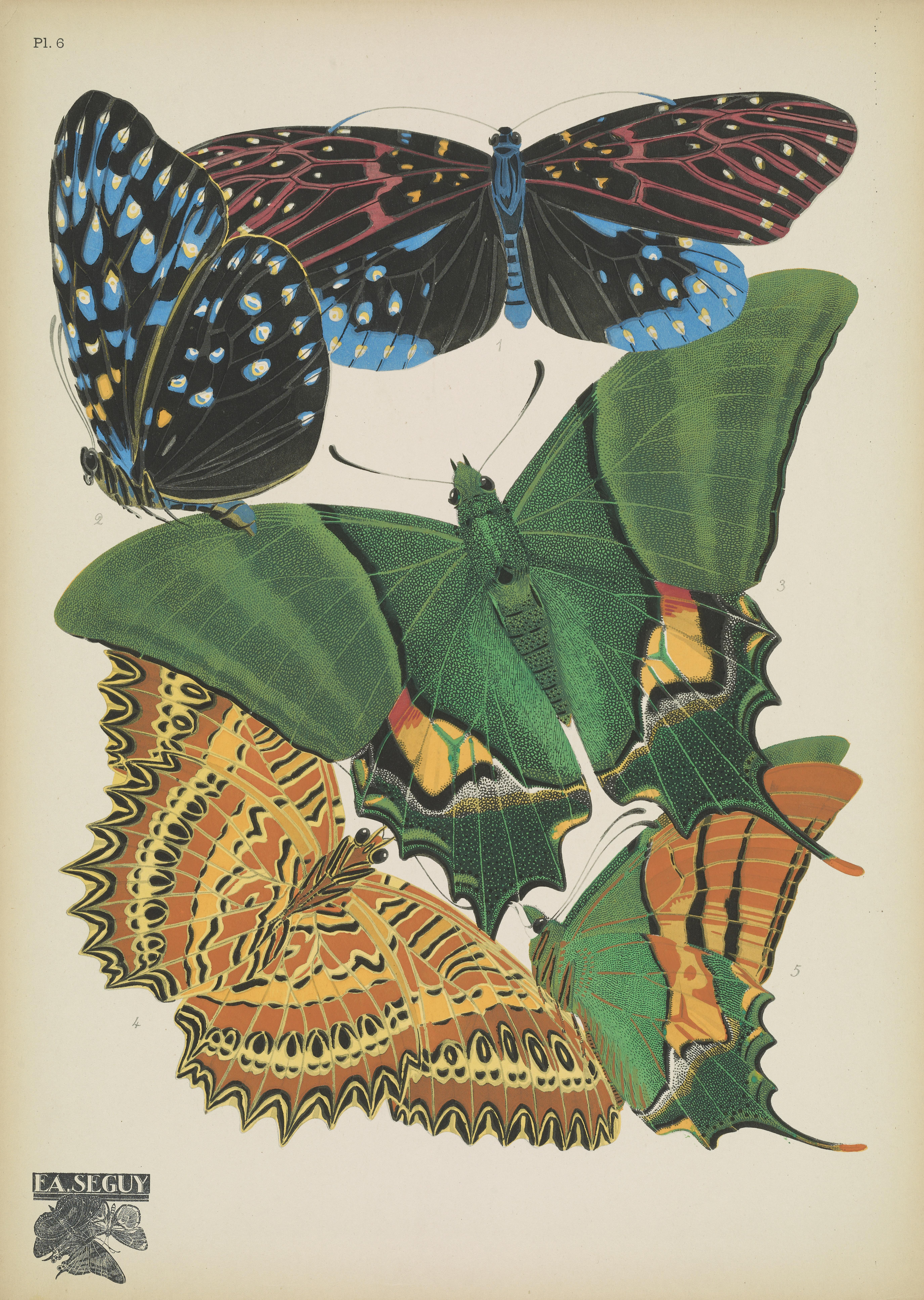 Papillons